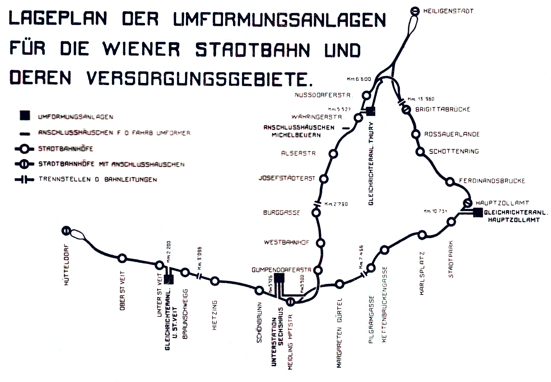 Lageplan der Umformungsanlagen für die Wiener Stadtbahn (1925)